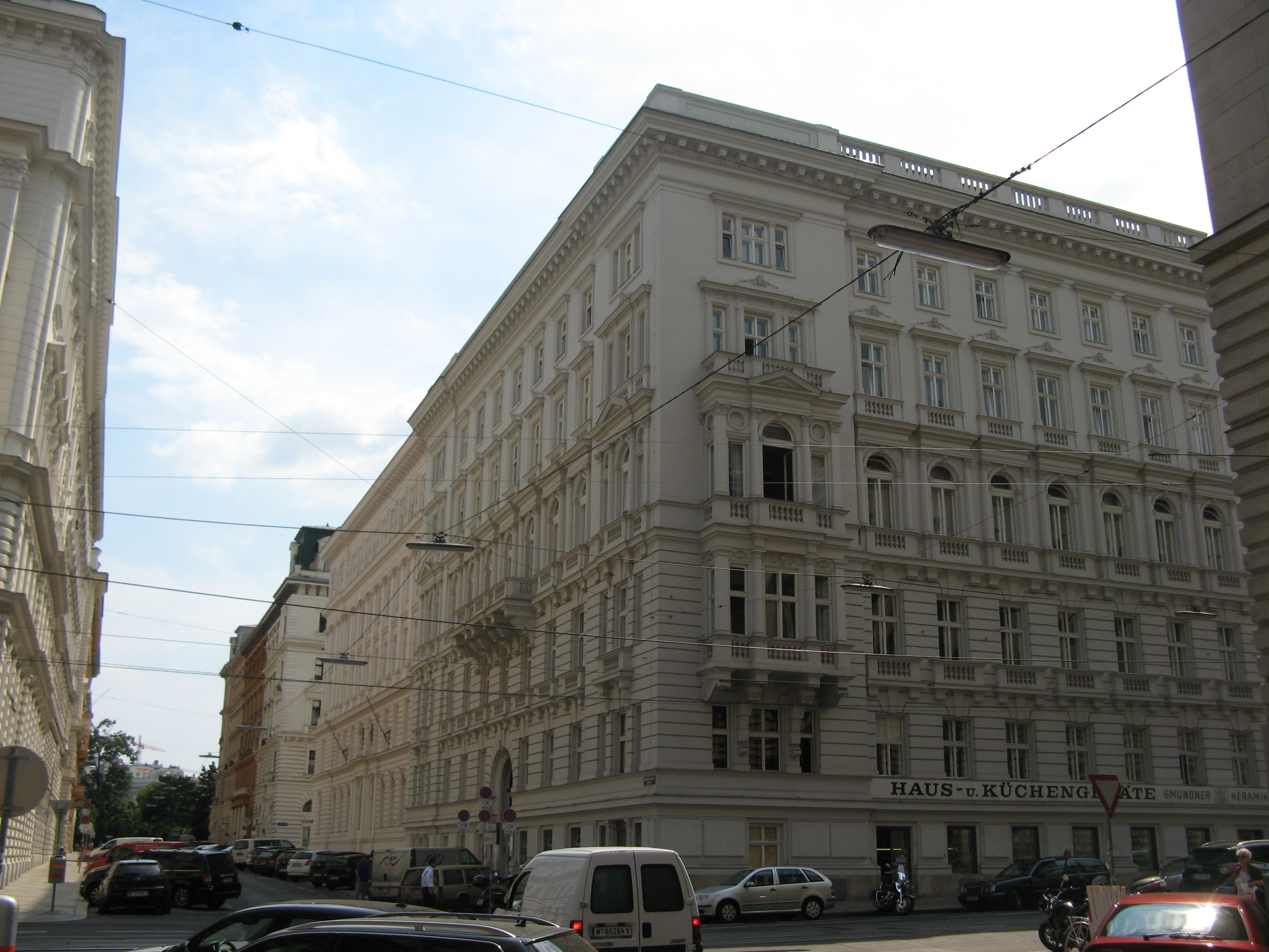 Bartensteingasse 9 (1883-1884) von Ludwig Tischler, Wien-Innere Stadt